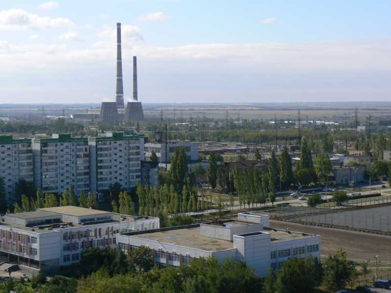 Вид ТЭЦ-2 с высотки